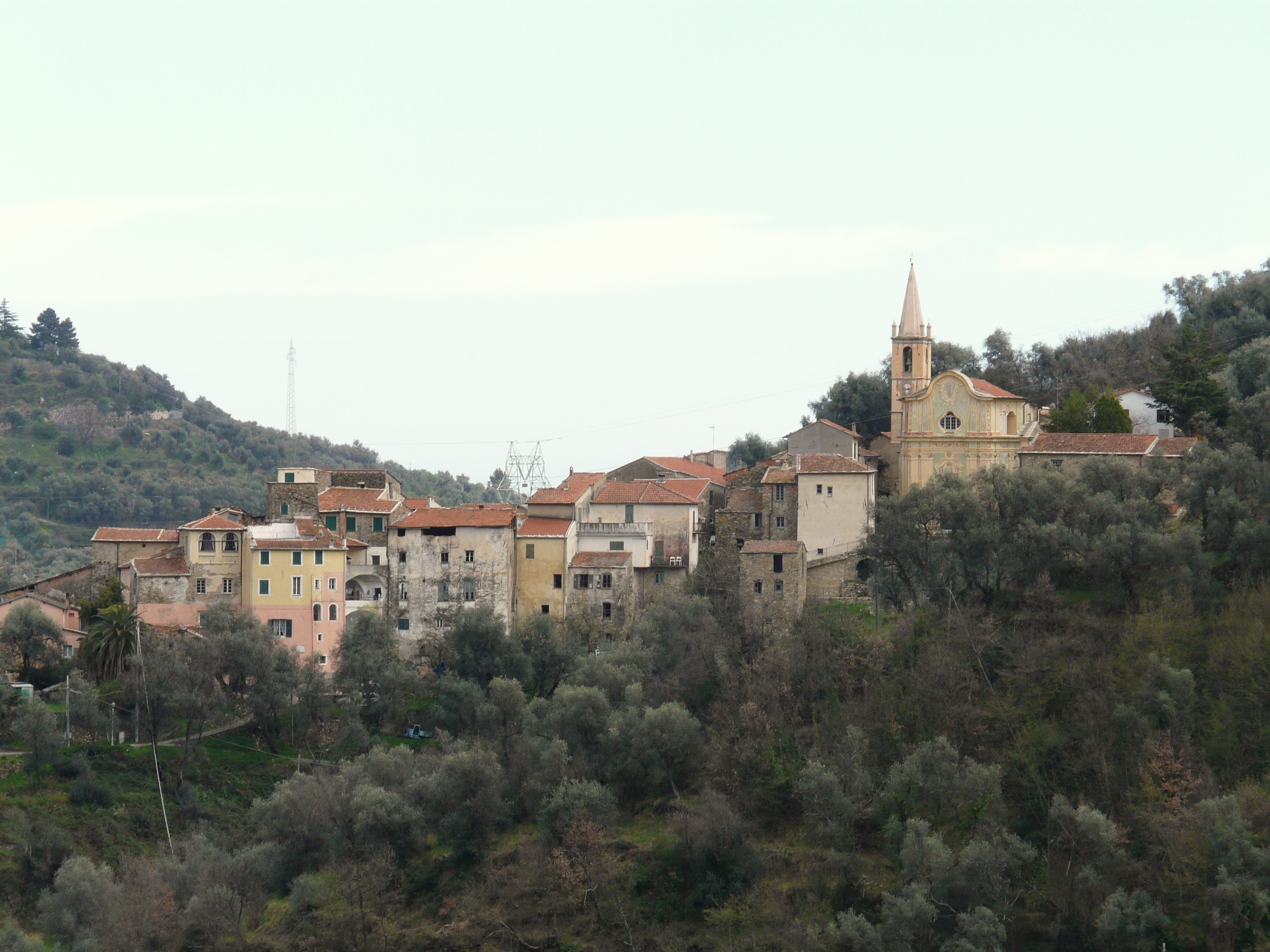 Torre Paponi, Pietrabruna, Liguria, Italia